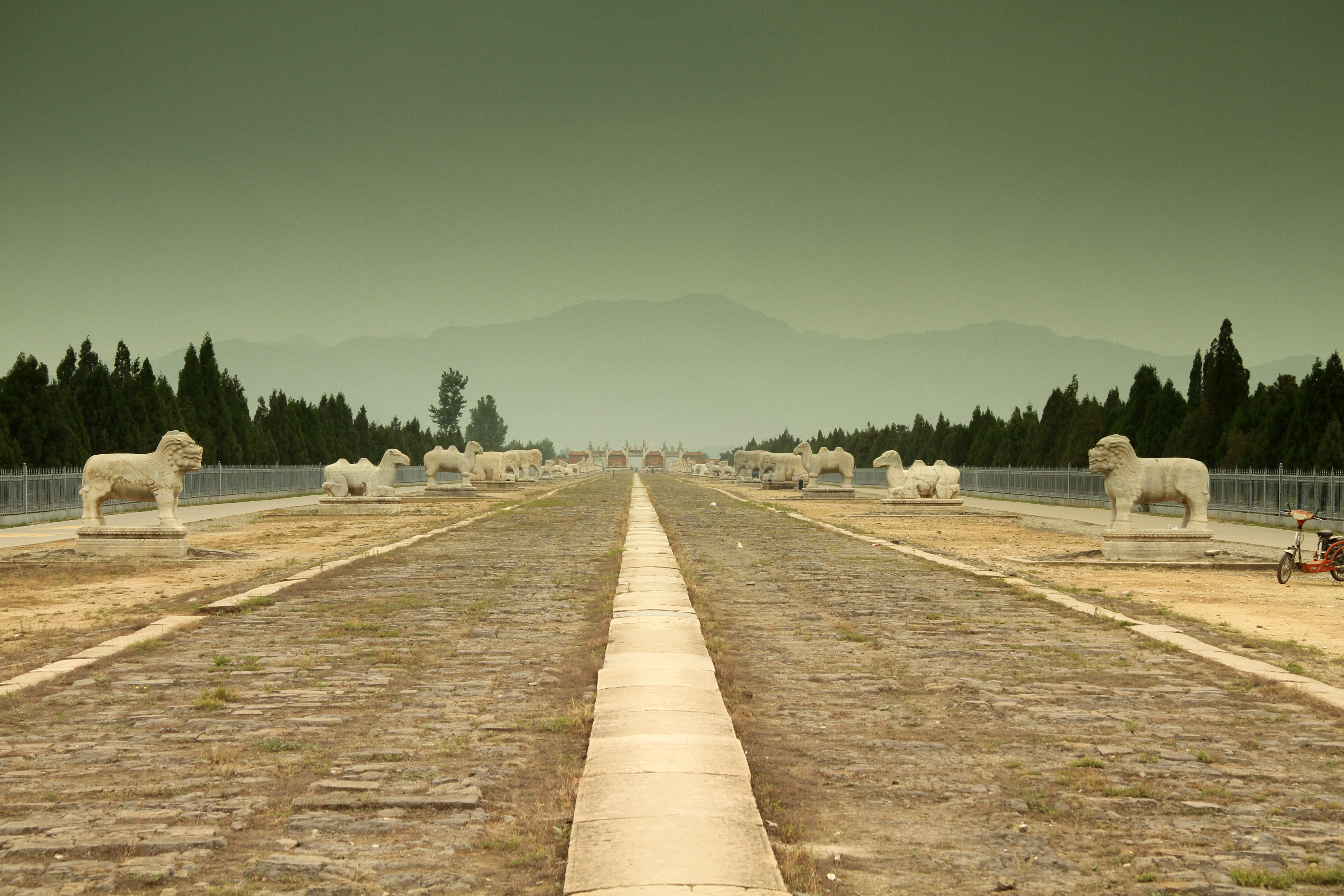 Qing Tombs 28